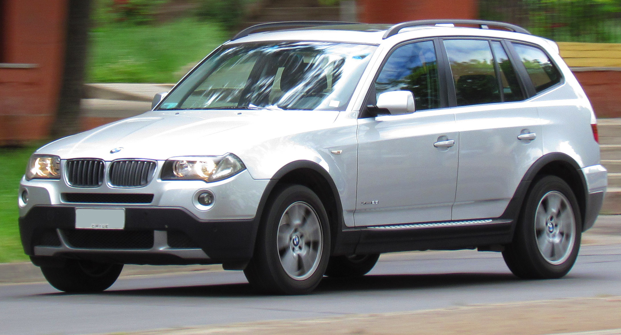 BMW X3 Xdrive25i 2010